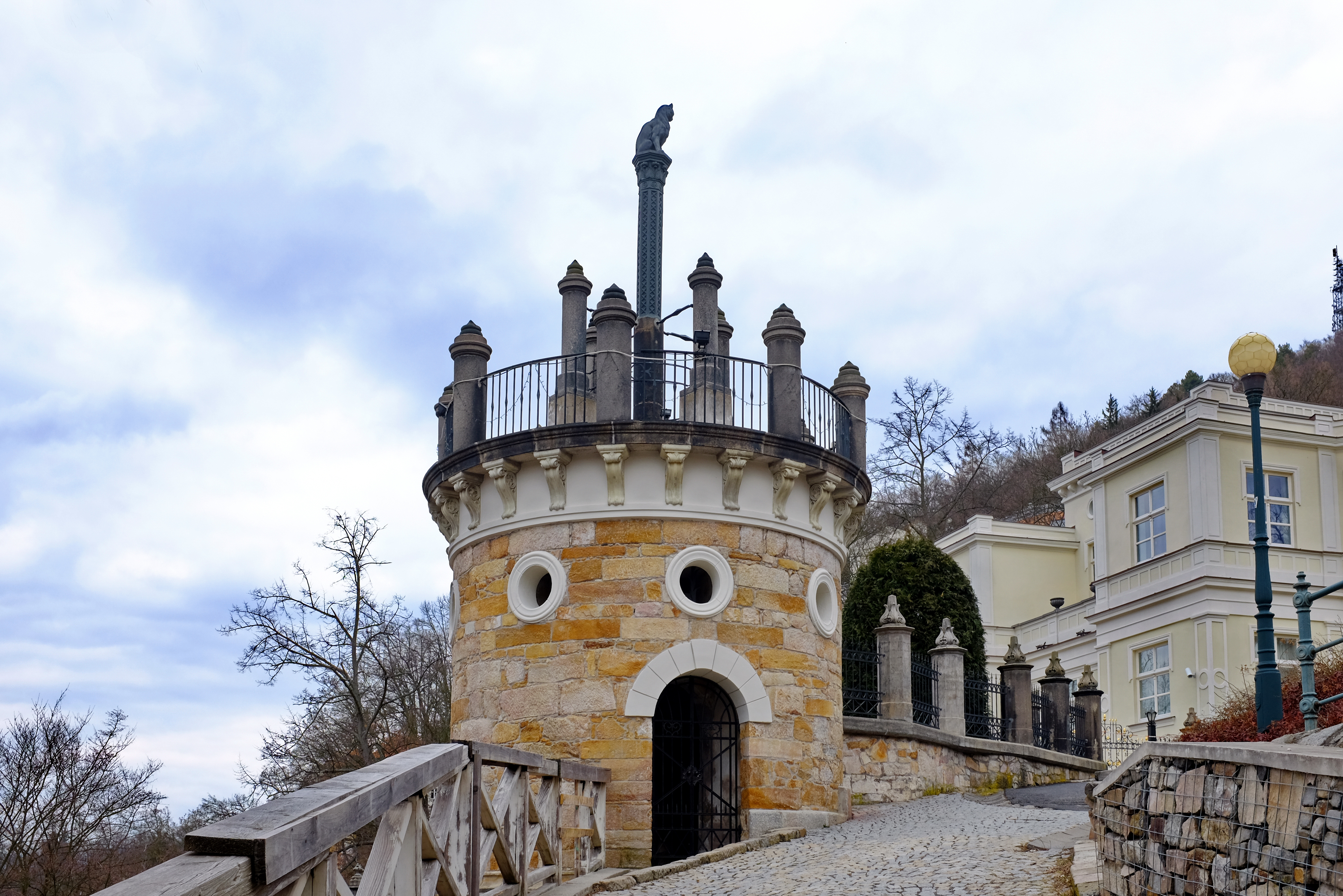 Karlovy Vary rondel se sochou kočky u Lützowovy vily, na Stezce Jeana De Carro